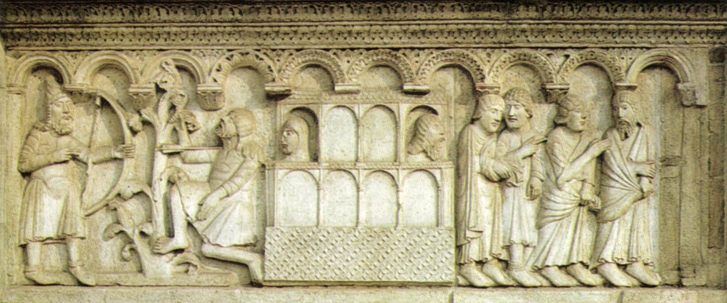 pd italia da: Il Duomo di Modena, atlante fotografico, Modena, edizioni Panini Spa. 1985.